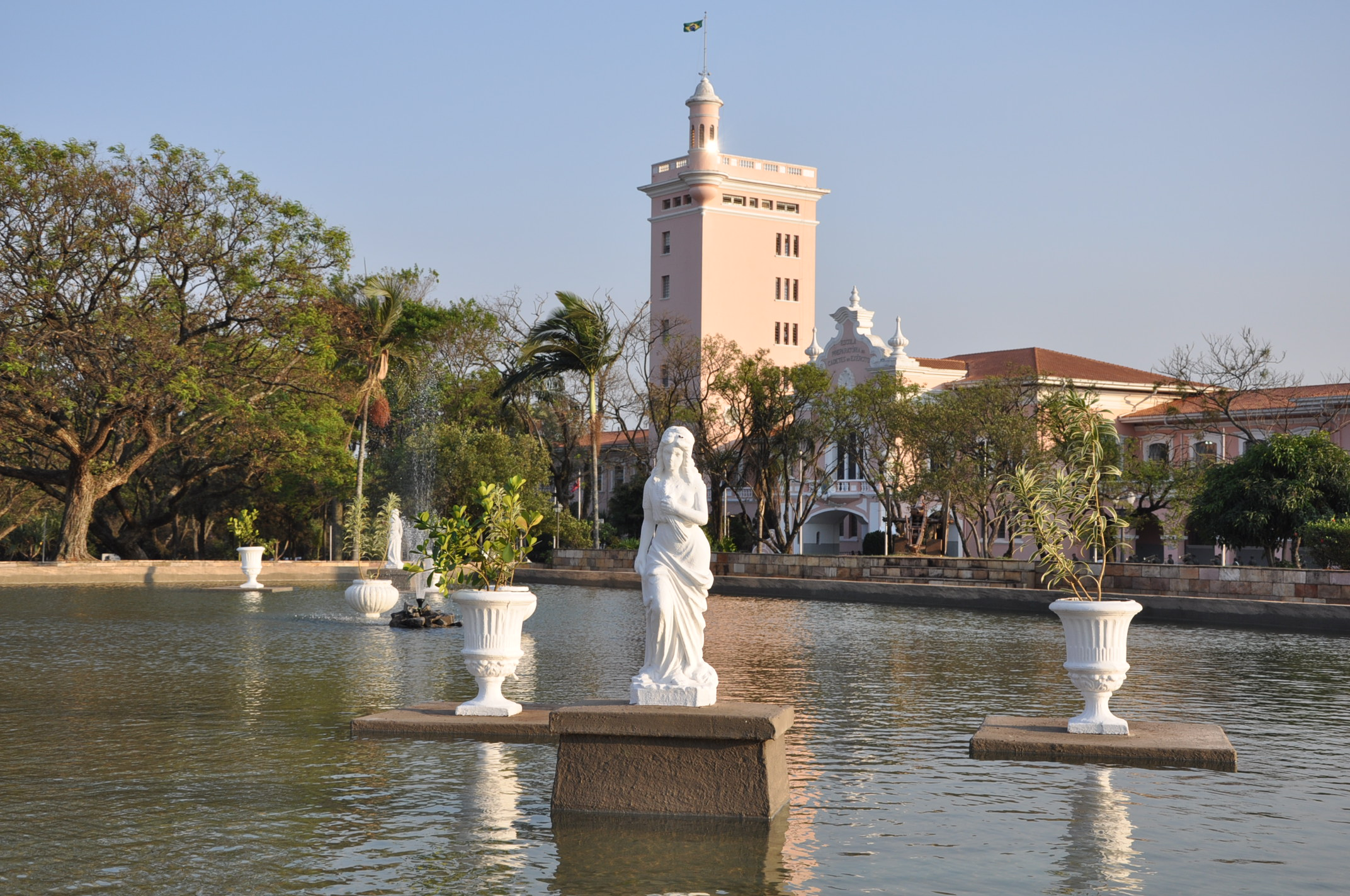 Patrimônio histórico-cultural da Escola